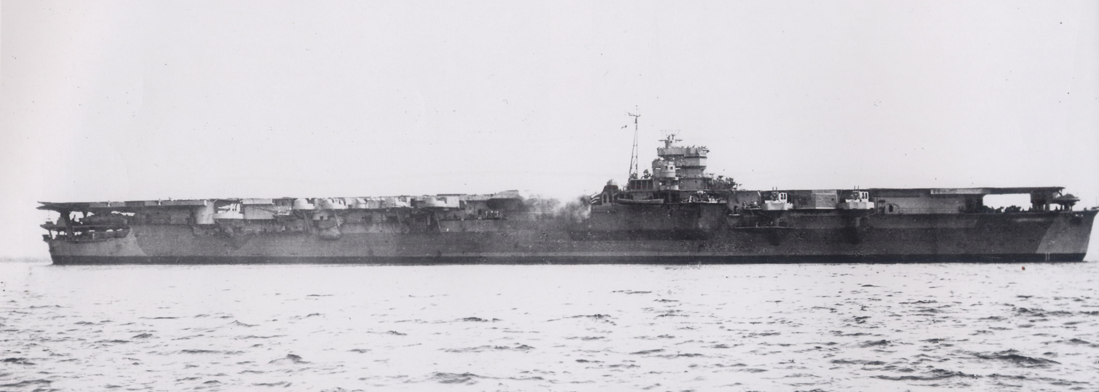 Unryu leaving Yokosuka (日本海軍航空母艦 雲龍型「雲龍」横須賀軍港を出港しているところ)